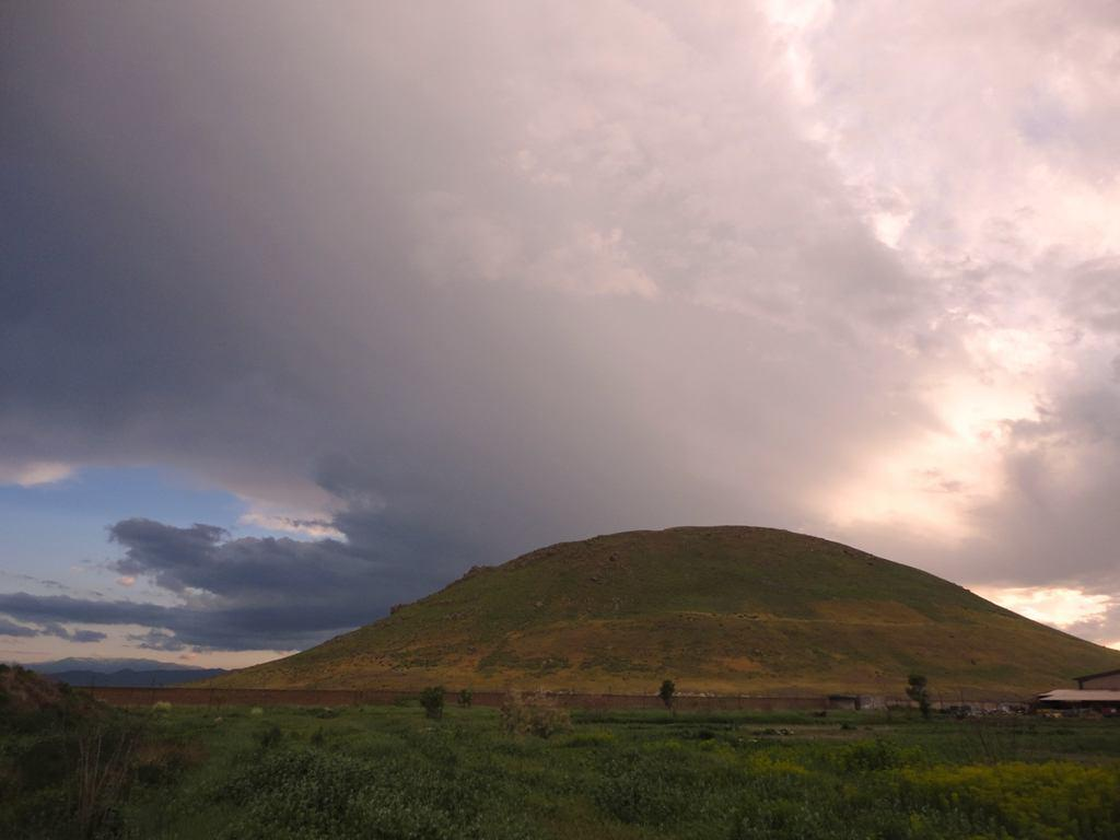 تۆرکجه: باشلی قالا داغی قصبه نین آدی بو داغ دان آلینیب دیر.